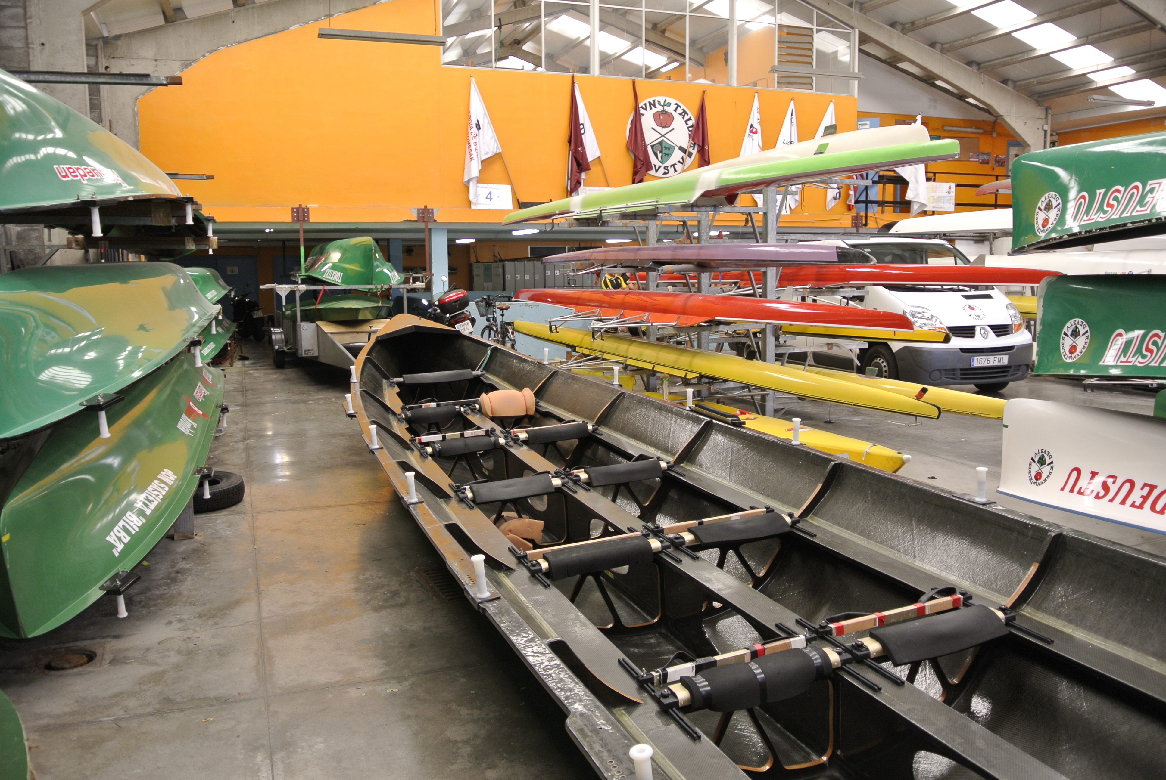 Interior de Deustu Arraun Taldea